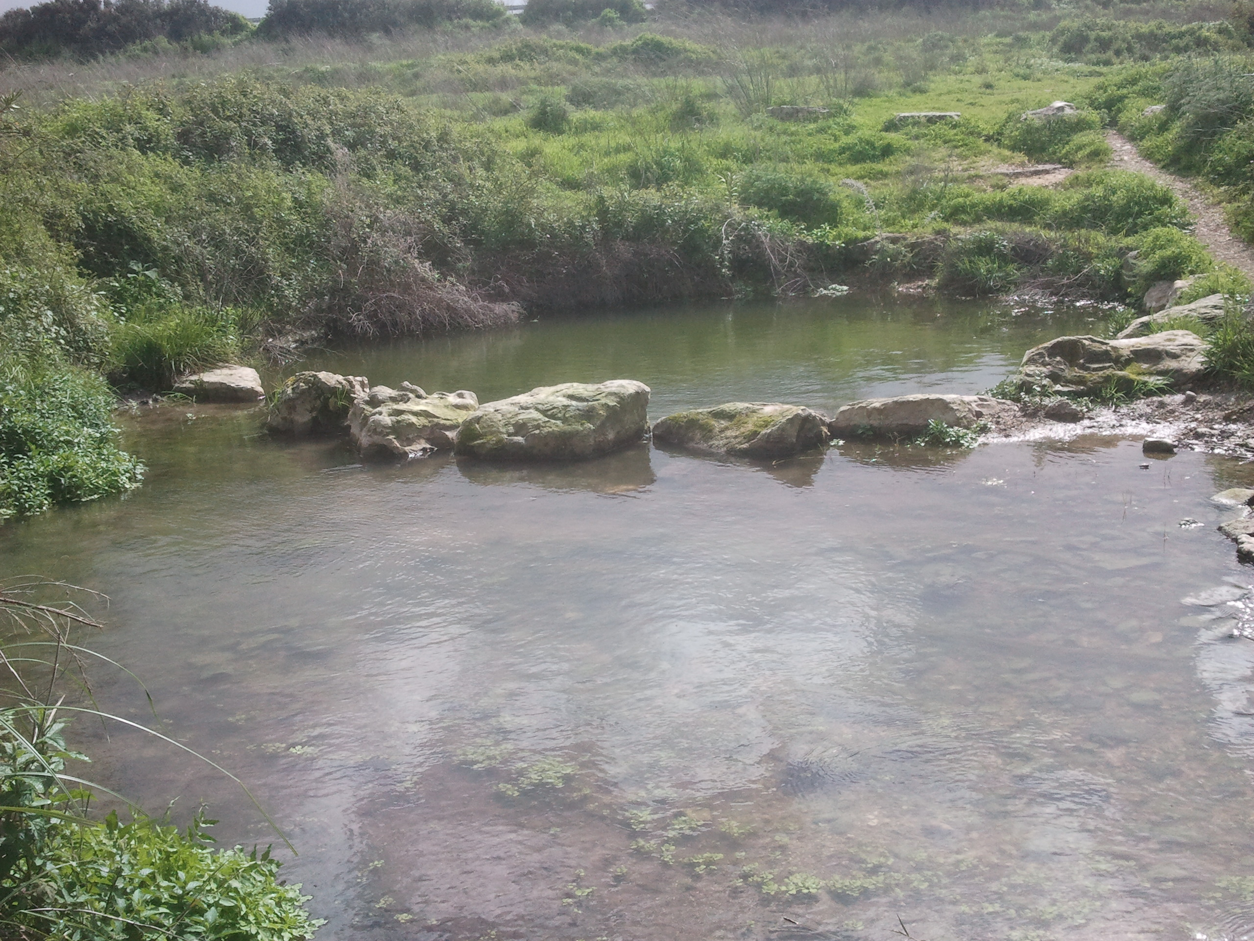 נחל תות מהווה גבול בין הר הכרמל ורמות מנשה. תחילתו ליד מחלף אליקים והוא נשפך לנחל דליה ליד בת שלמה בריכת מים בנחל כ-300 מטר ממזרח לכביש לתחנת כוח חגית